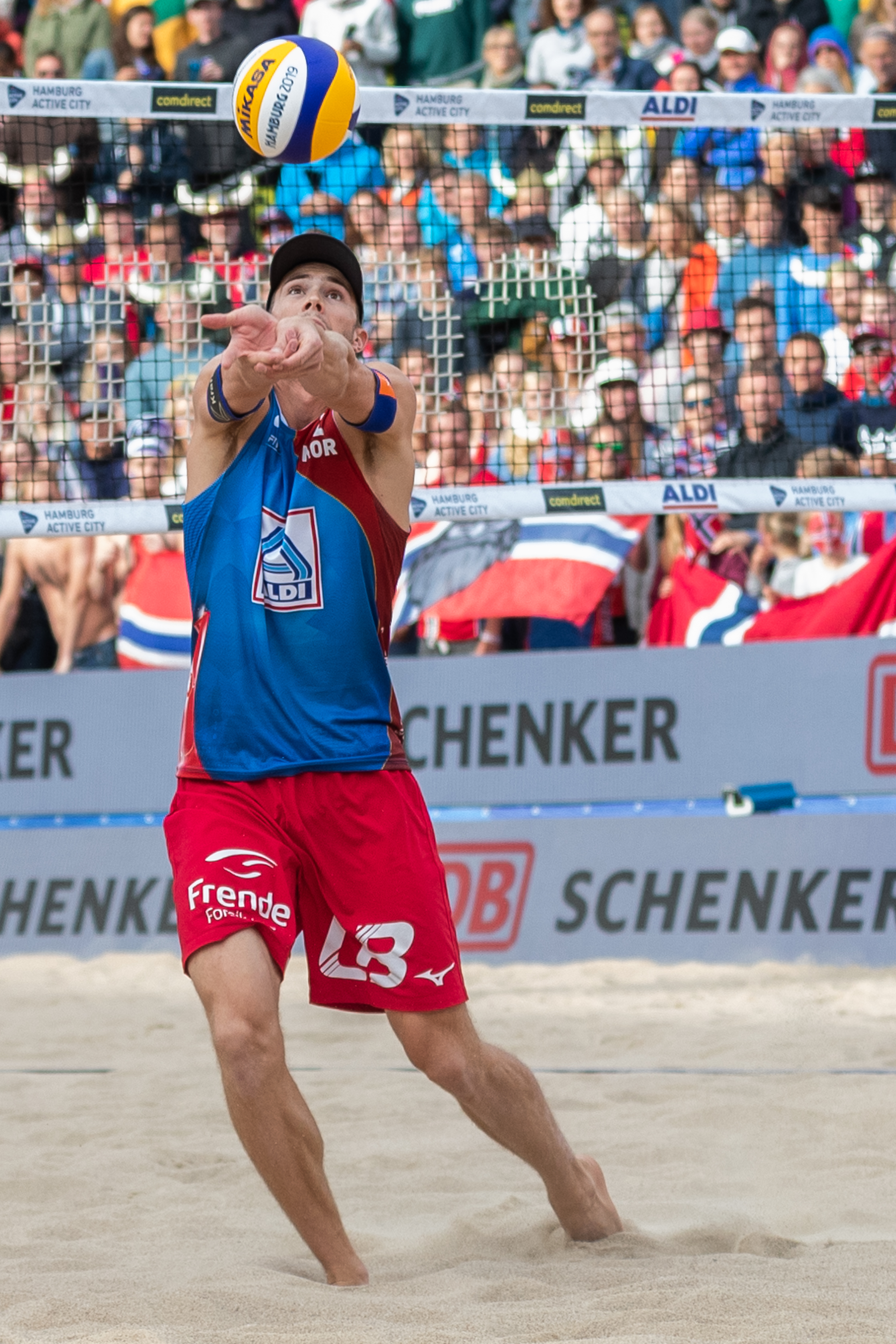 BeachVolleyball Weltmeisterschaft Hamburg 2019; Anders Berntsen Mol (NOR, Norwegen)